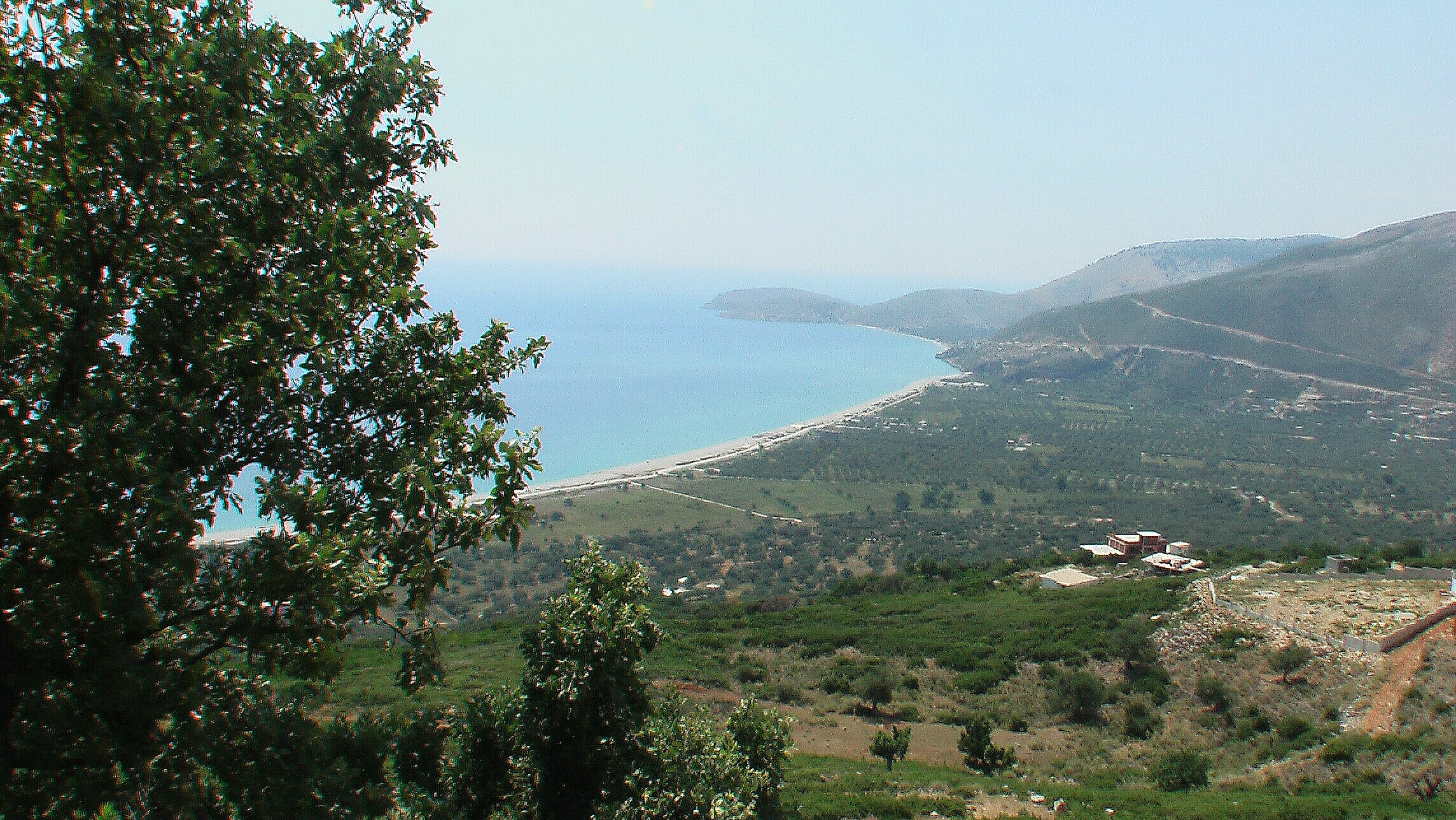 Borsh, Albanische Riviera